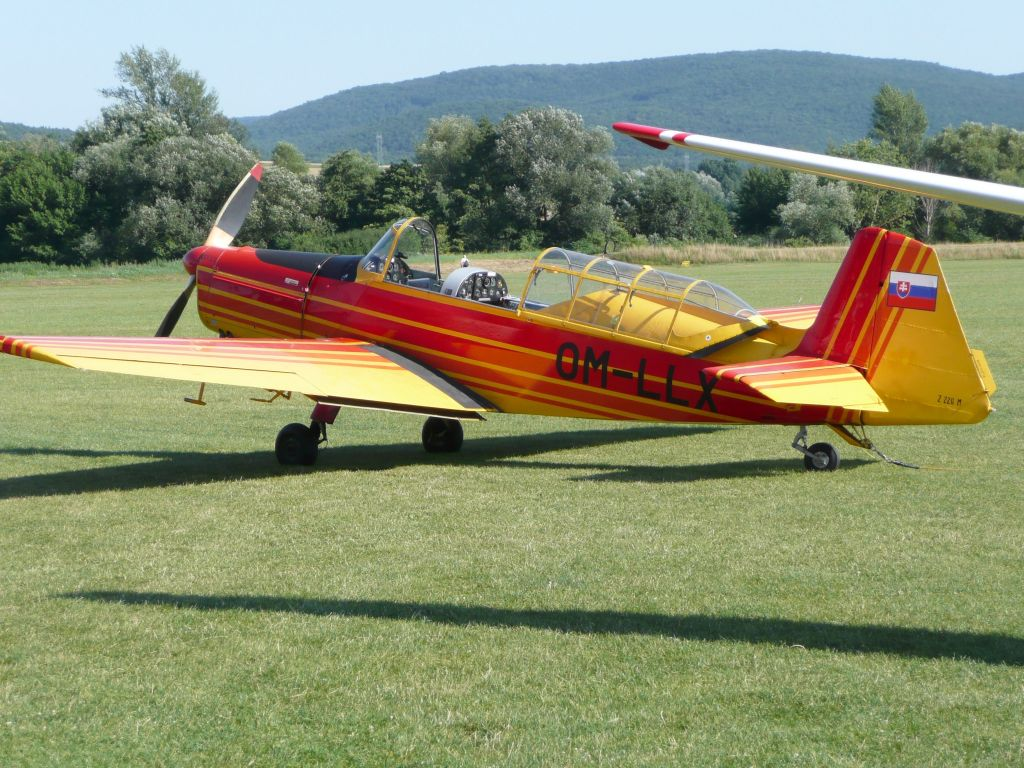 Zlín Z-226M (OM-LLX) na letisku Malé Bielice - Partizánske